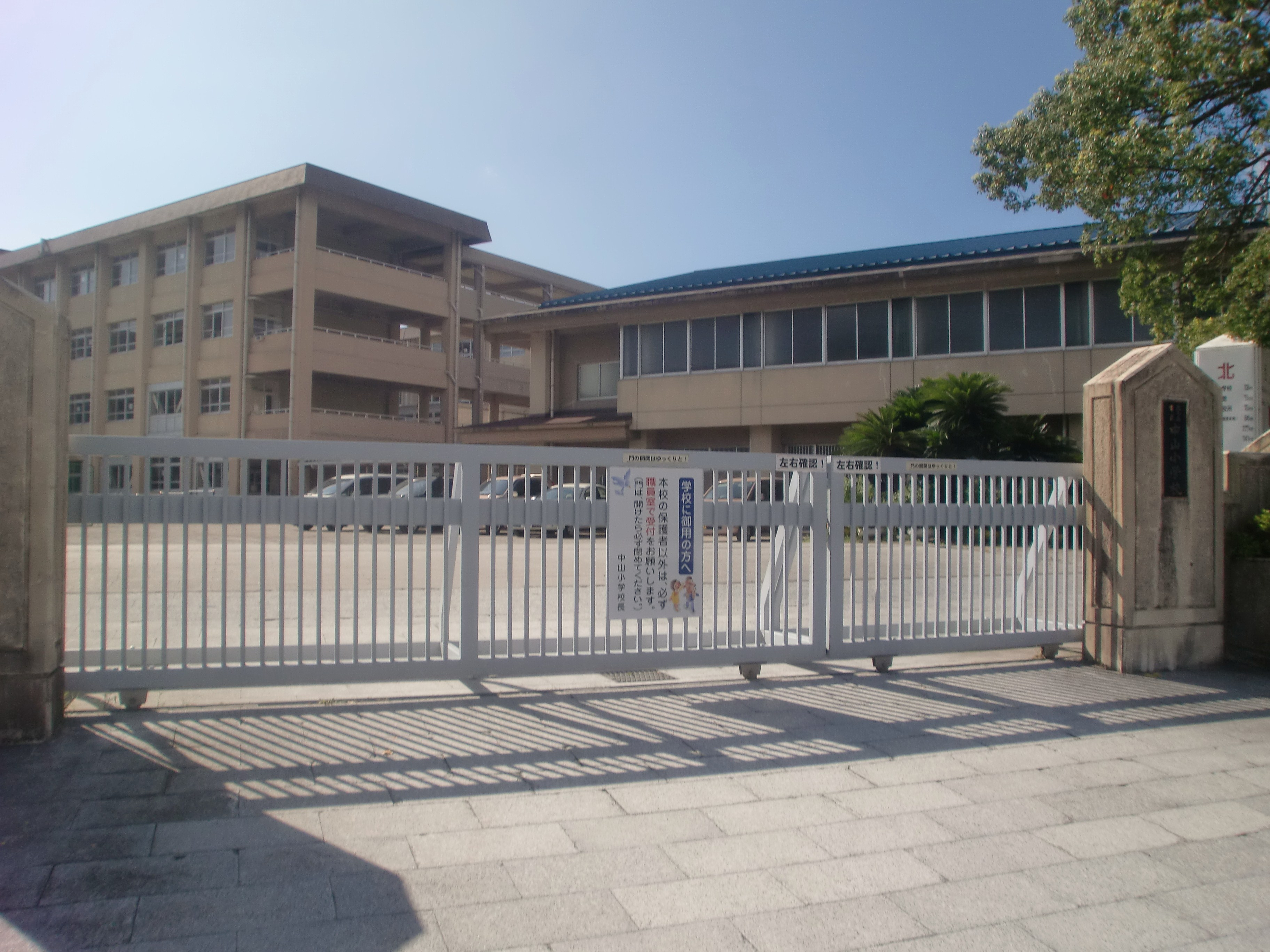 鹿児島市立中山小学校の外観。